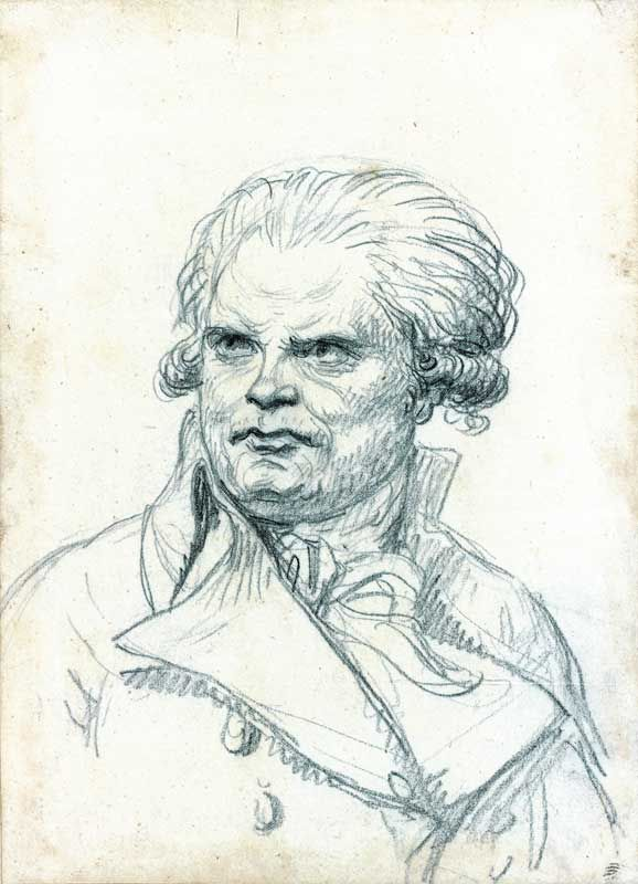 Danton dessiné par Jacques-Louis David, crayon noir, collection privée.